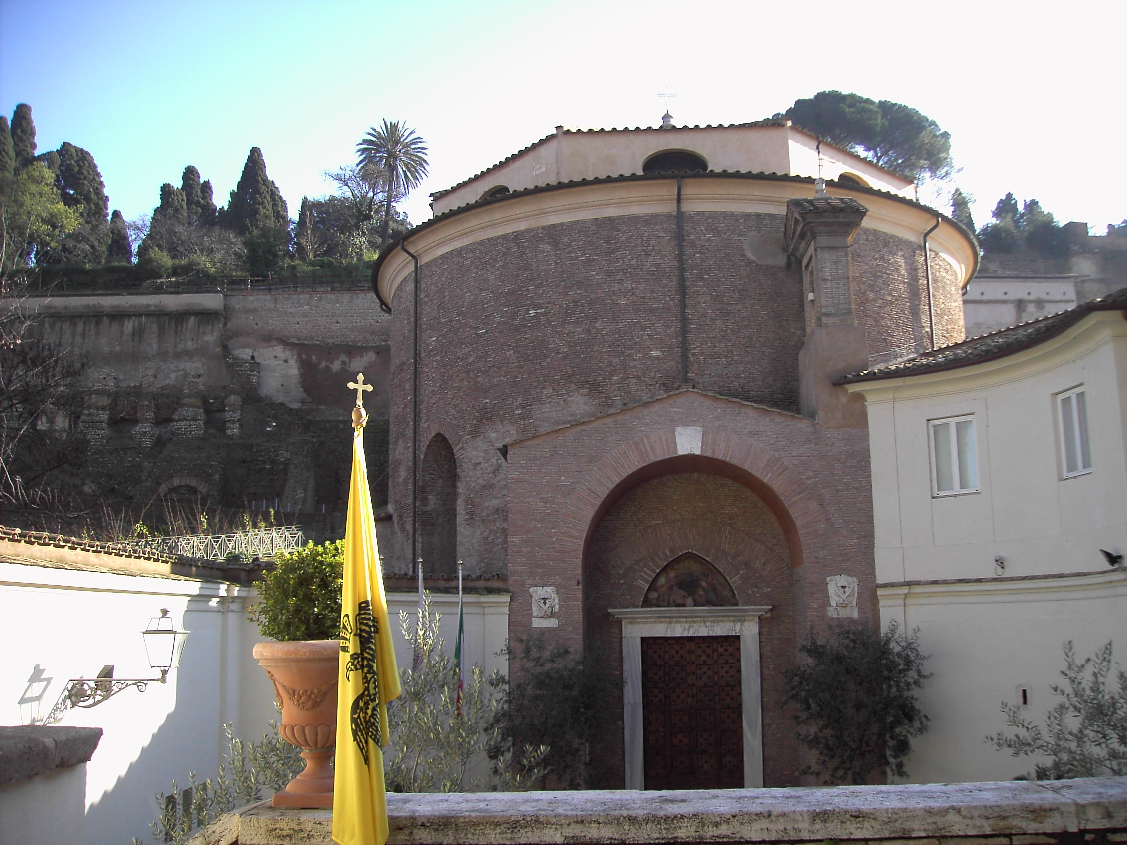 Roma, san Teodoro al Palatino.